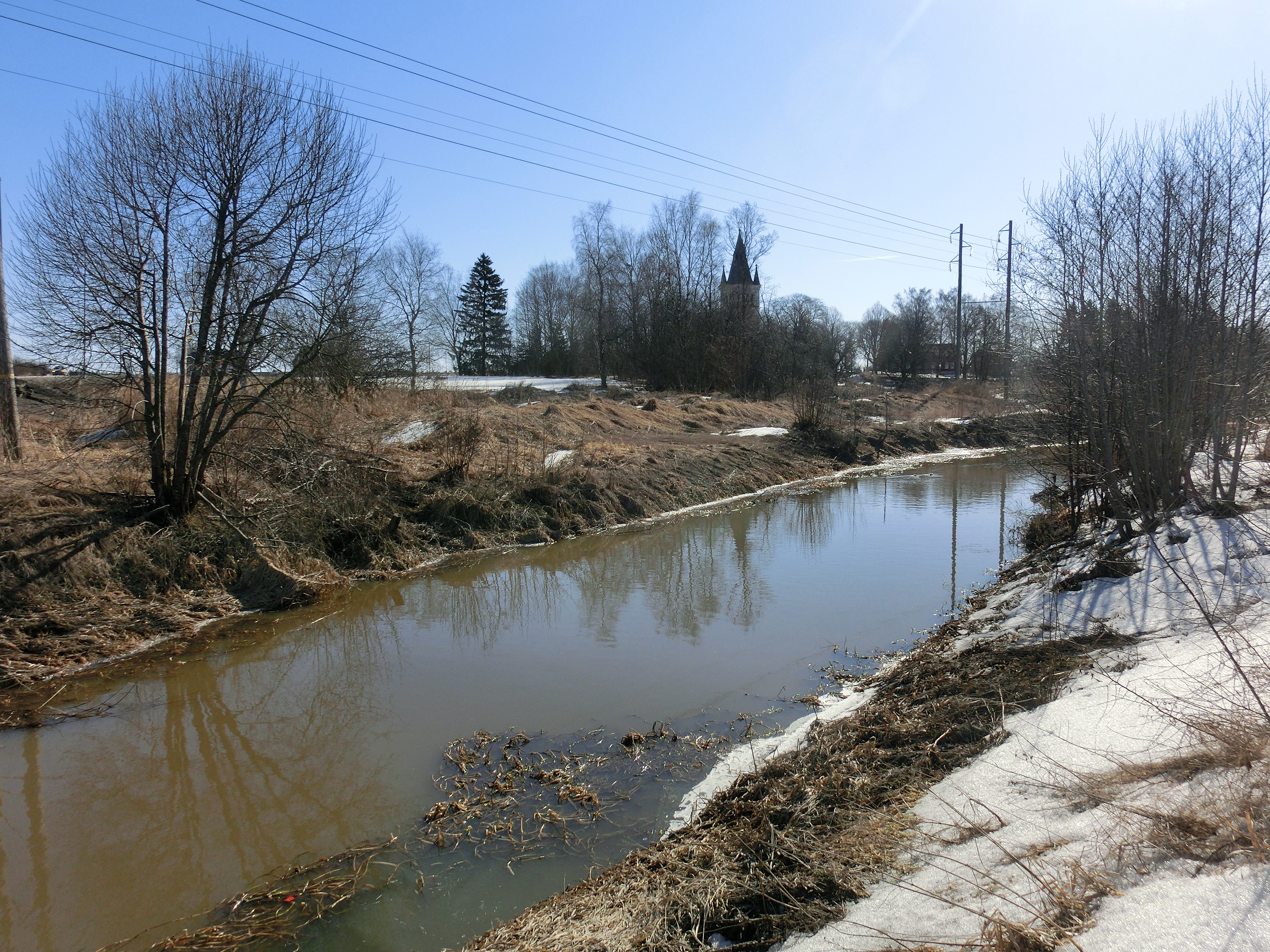 Sagån vid bron för Uppsalavägen (Väg 56 och 72), Sala, Sala kommun, Västmanlands län, Västmanland, Sverige. I bakgrunden ses Norrby kyrka, som tillhör landskapet Uppland.